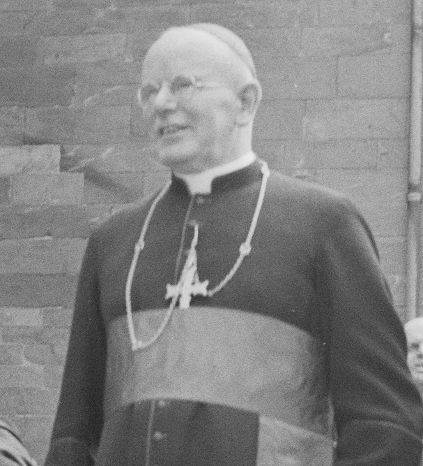 Bildet er hentet fra Arkivverket. Katolsk kirkefest i Trondheim. NÅ nr. 17, 1953. Kardinal Griffin, katolsk biskop Mangers, katolsk bisko Rüth, munker, nonner, Stiklestad kirke Nidarosdomen. Arkivinstitusjon : Riksarkivet Arkivnavn : Billedbladet NÅ Sted : Norge, Sør-Trøndelag, Trondheim, Emneord: Religiøse fester Avbildet